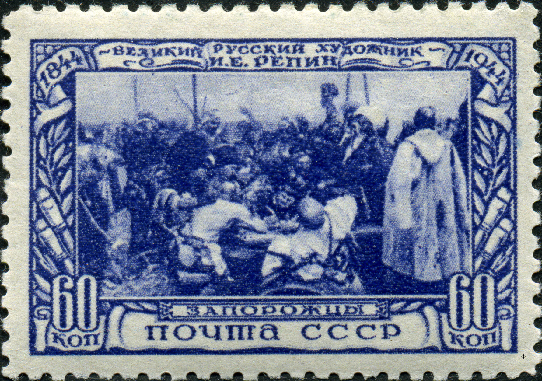 Почтовая марка СССР. ЦФА 940. Запорожцы пишут письмо турецкому султану (по картине И. Репина, 1880-1891)